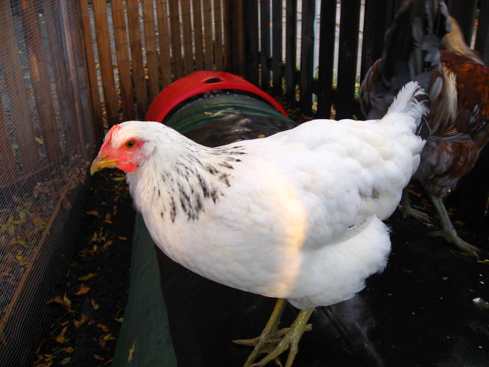 A Delaware hen.